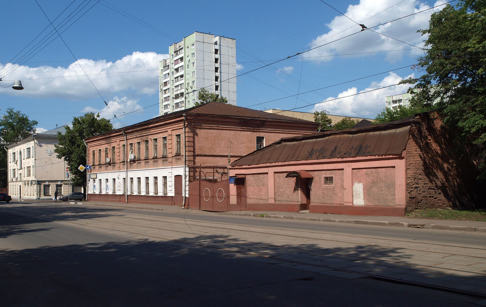 Bolshaya Andronyevskaya Street, Moscow (former Rogozhskaya Sloboda)Большая Андроньевская улица, Москва (б. Рогожская слобода). Бывшая колбасная фабрика Григорьева. Снесена в июле 2017.